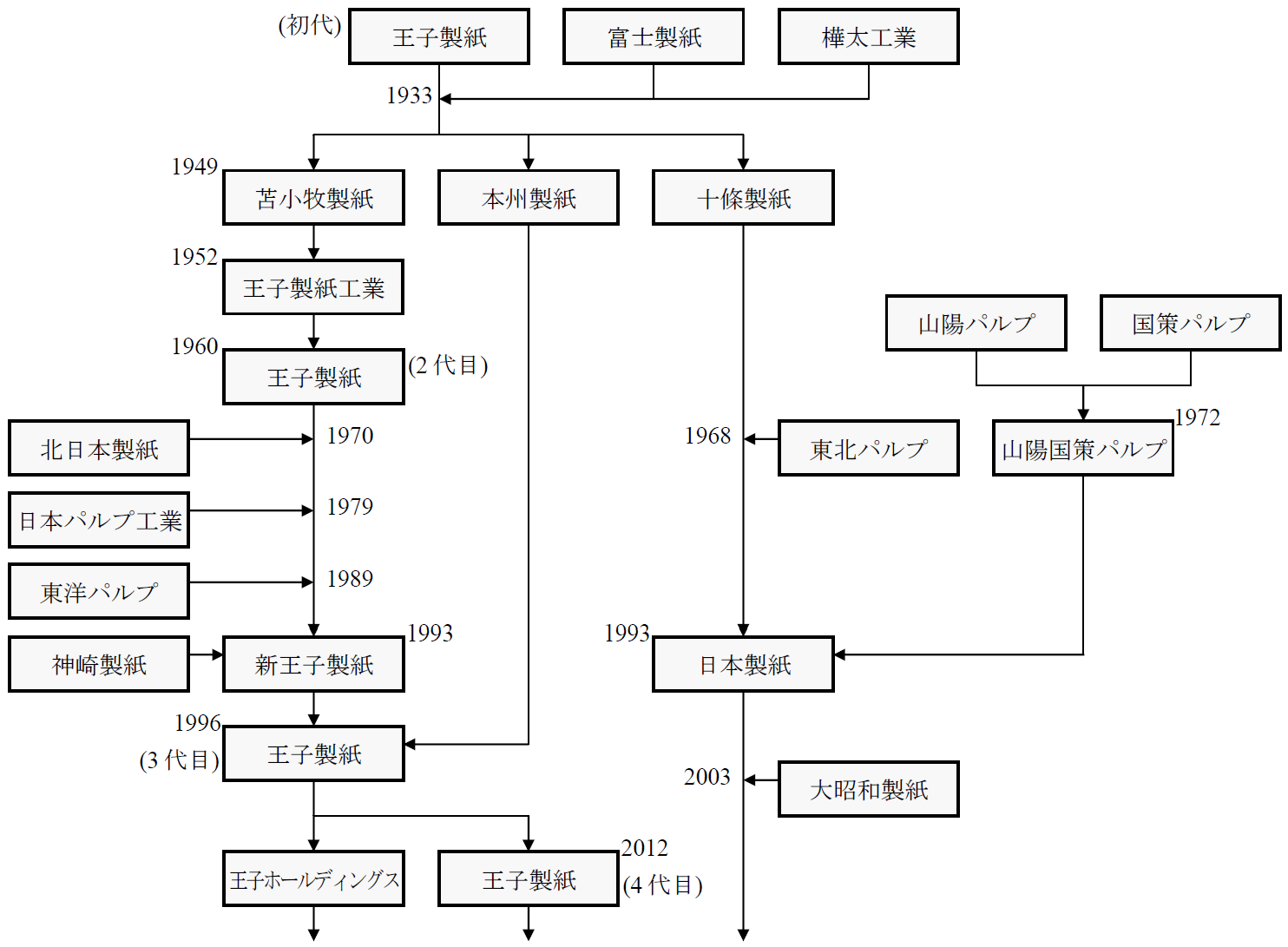 日本の製紙各社（王子製紙, 富士製紙, 樺太工業, 苫小牧製紙, 本州製紙, 十條製紙, 王子製紙工業, 北日本製紙, 日本パルプ工業, 東洋パルプ, 神崎製紙, 新王子製紙, 王子ホールディングス, 山陽パルプ, 国策パルプ, 山陽国策パルプ, 東北パルプ, 日本製紙, 大昭和製紙）のおおまかな合併図